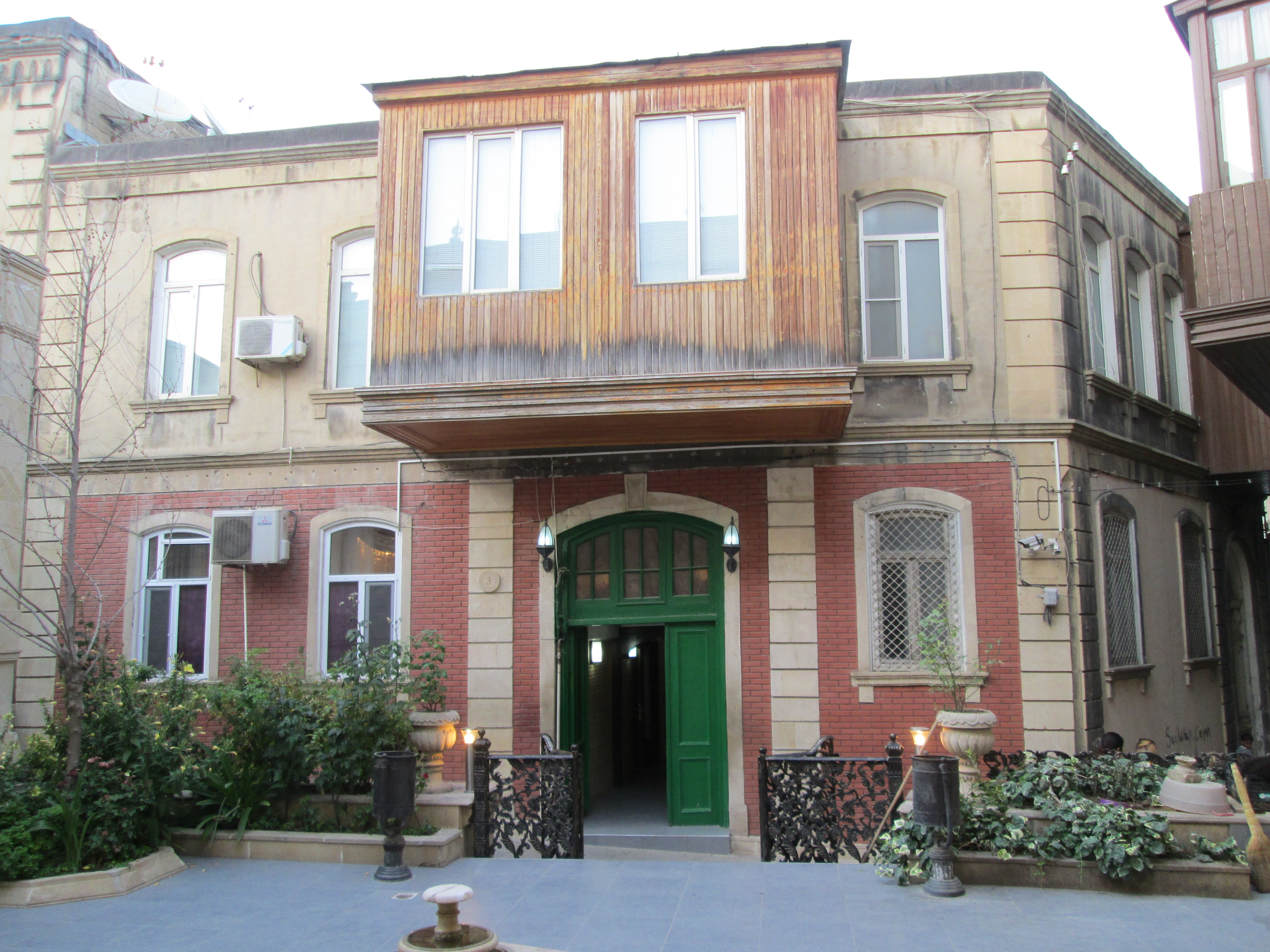 Firdovsi 3